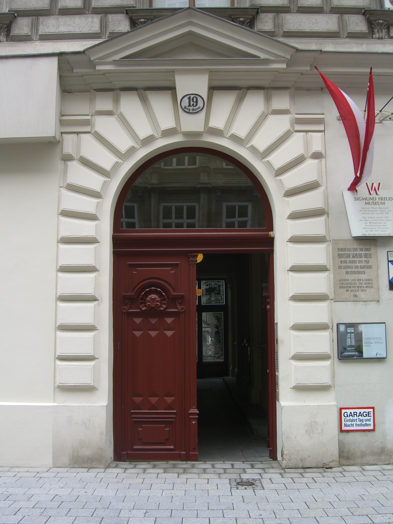 Puerta principal de la casa ubicada en Berggasse 19, Viena IX, donde se encontraba el piso que habitaba Sigmund Freud y su consultorio. Desde el 15 de junio de 1971, sede del Museo Sigmund Freud de Viena (Sigmund Freud Museum Wien IX).